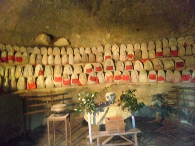 ほうらい丘駅にある「霊窟」内部の様子。投稿者本人による撮影。